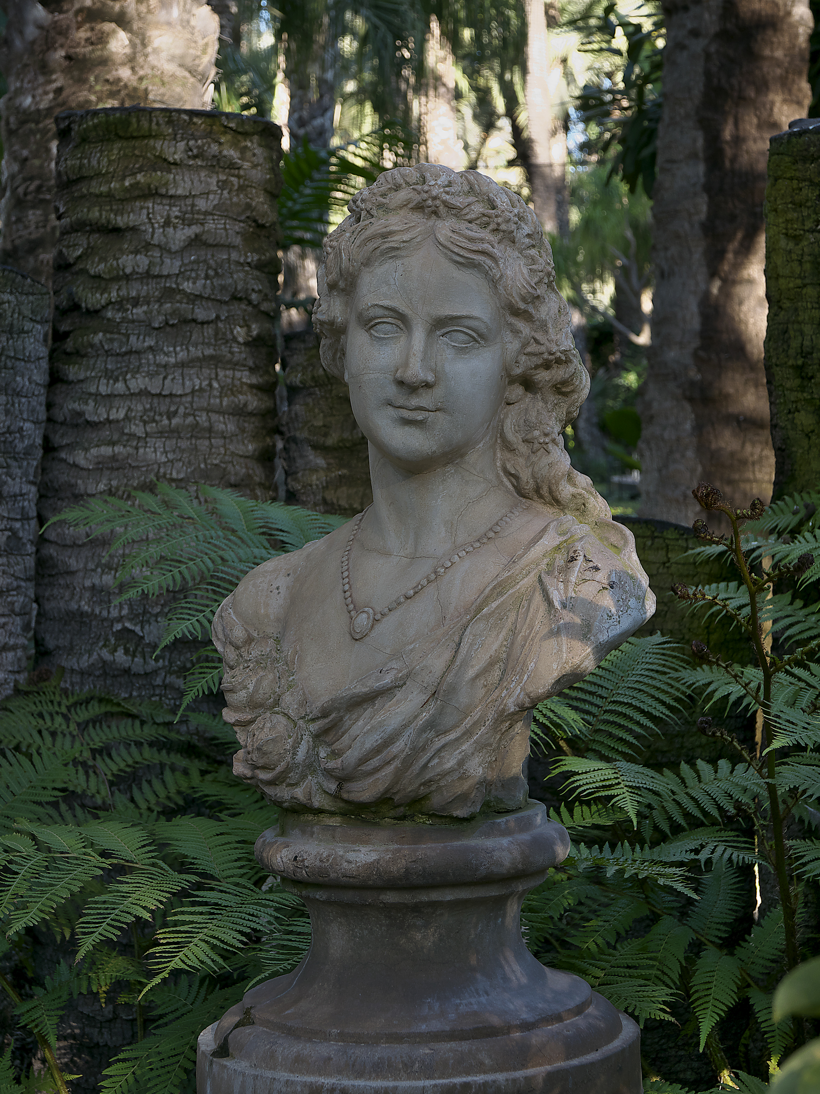 Busto de Isabel de Baviera de José Sánchez Lozano (1953) para el Huerto del Cura.